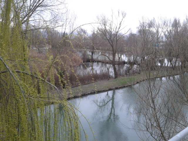 Le paludi